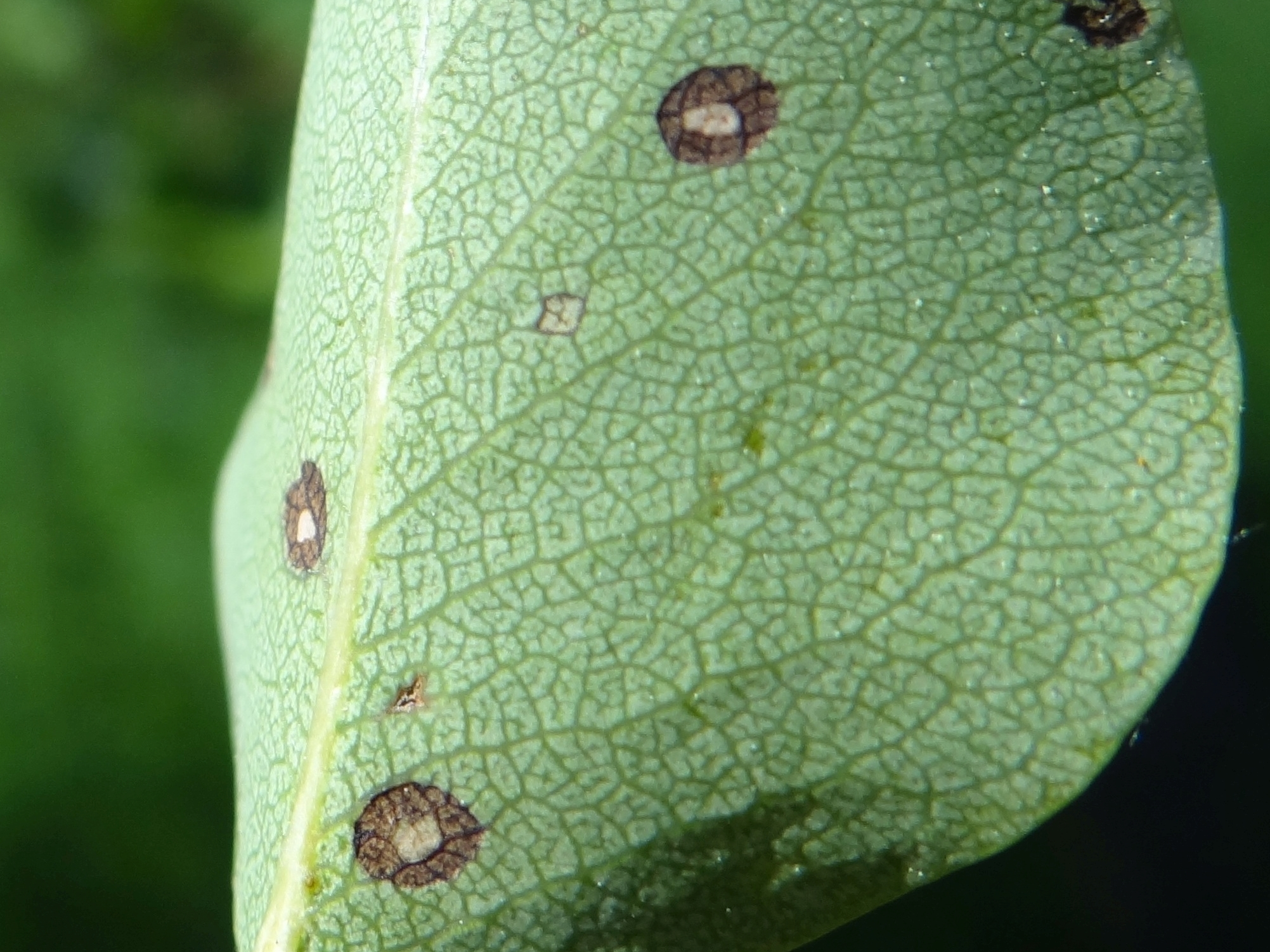 {Mycosphaerella pyri on leaf Pyrus communis. Location: Poland, Trzciana, województwo małopolskie